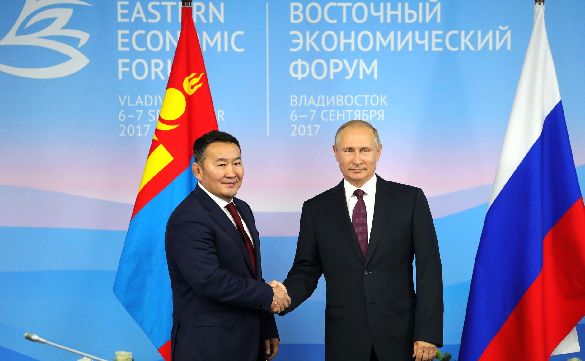 Президент России Владимир Путин с Президентом Монголии Халтмагийн Баттулгой